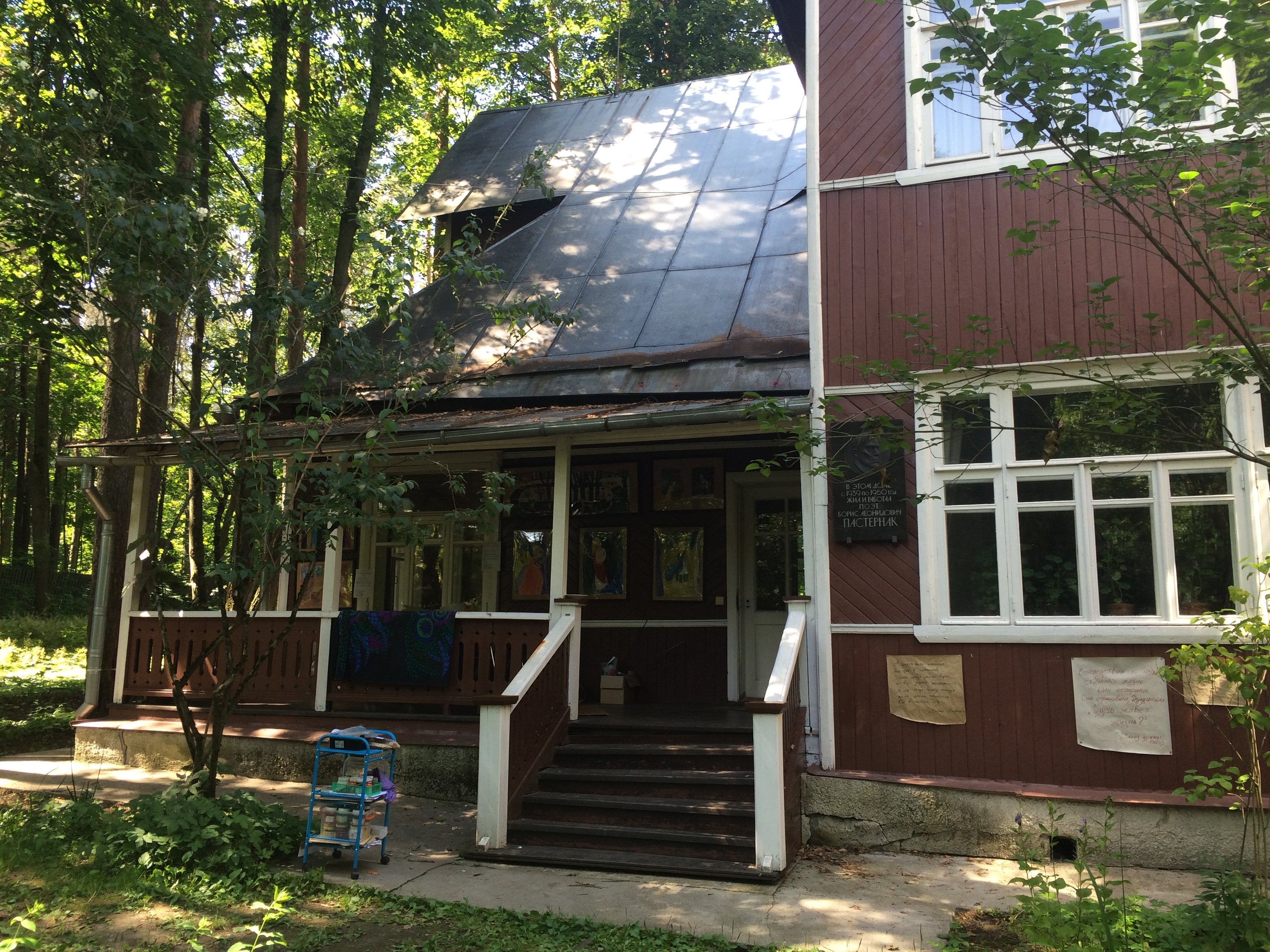 Дом, где жил и работал Б. Л. Пастернак (в 1939-1960 гг.): улица Павленко, 3, Переделкино, Новомосковский округ, Москва